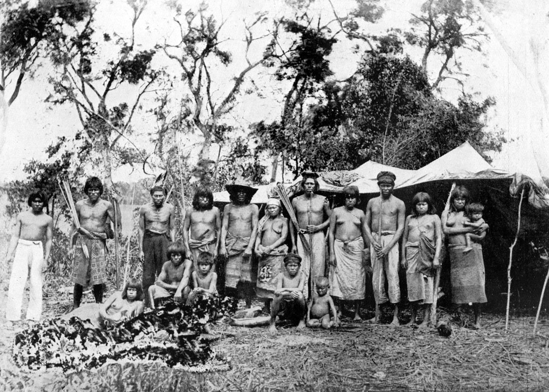 Tribu pequeña de tobas, delante de sus toldos, cerca del río Pilcomayo, 1892. Excursion Científica por los ríos Paraguay, Alto Paraná e Iguazú, en 1892